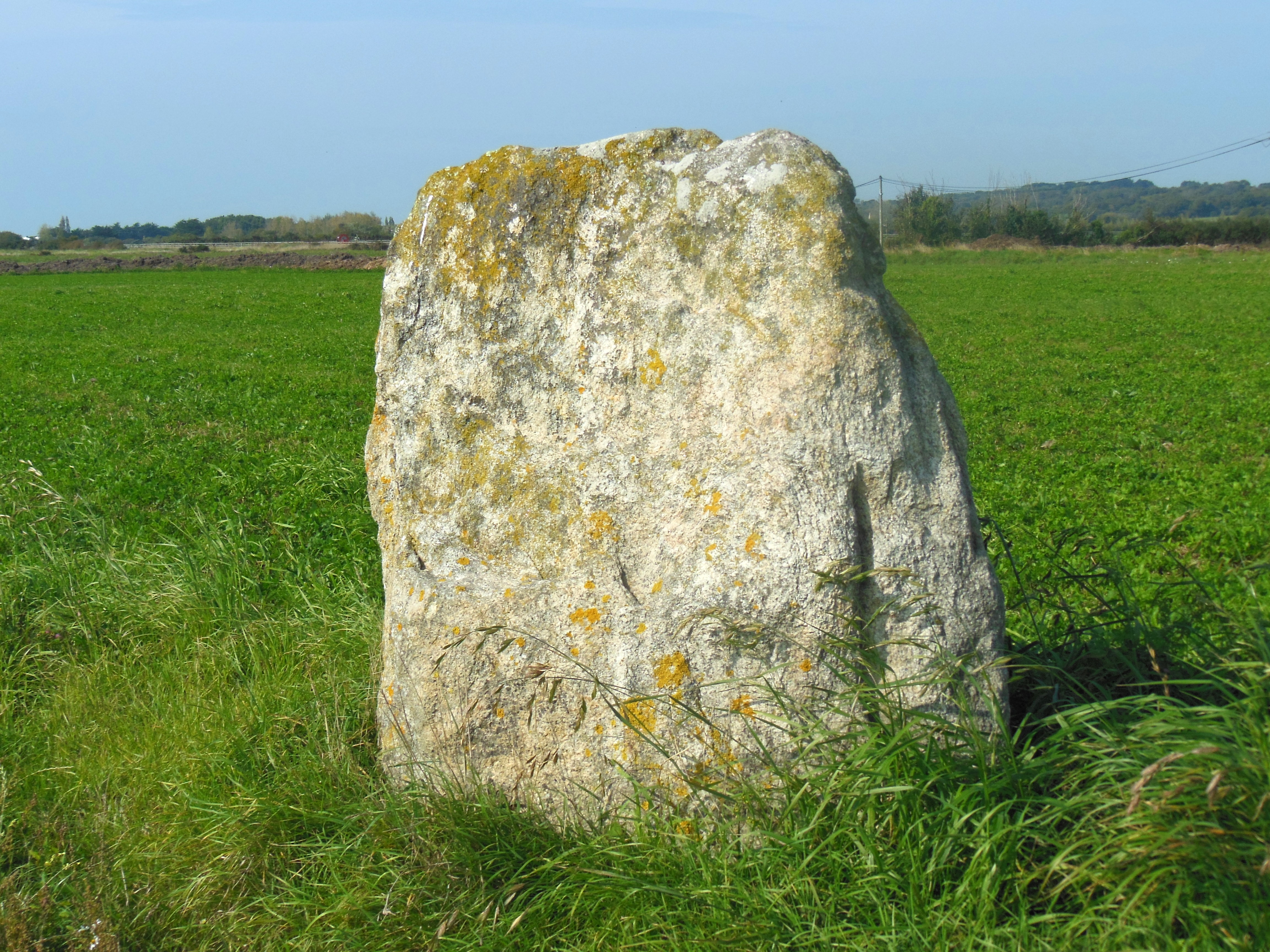 Pierre de Saillé, menhir situé dans le village de Saillé, sur la commune de Guérande